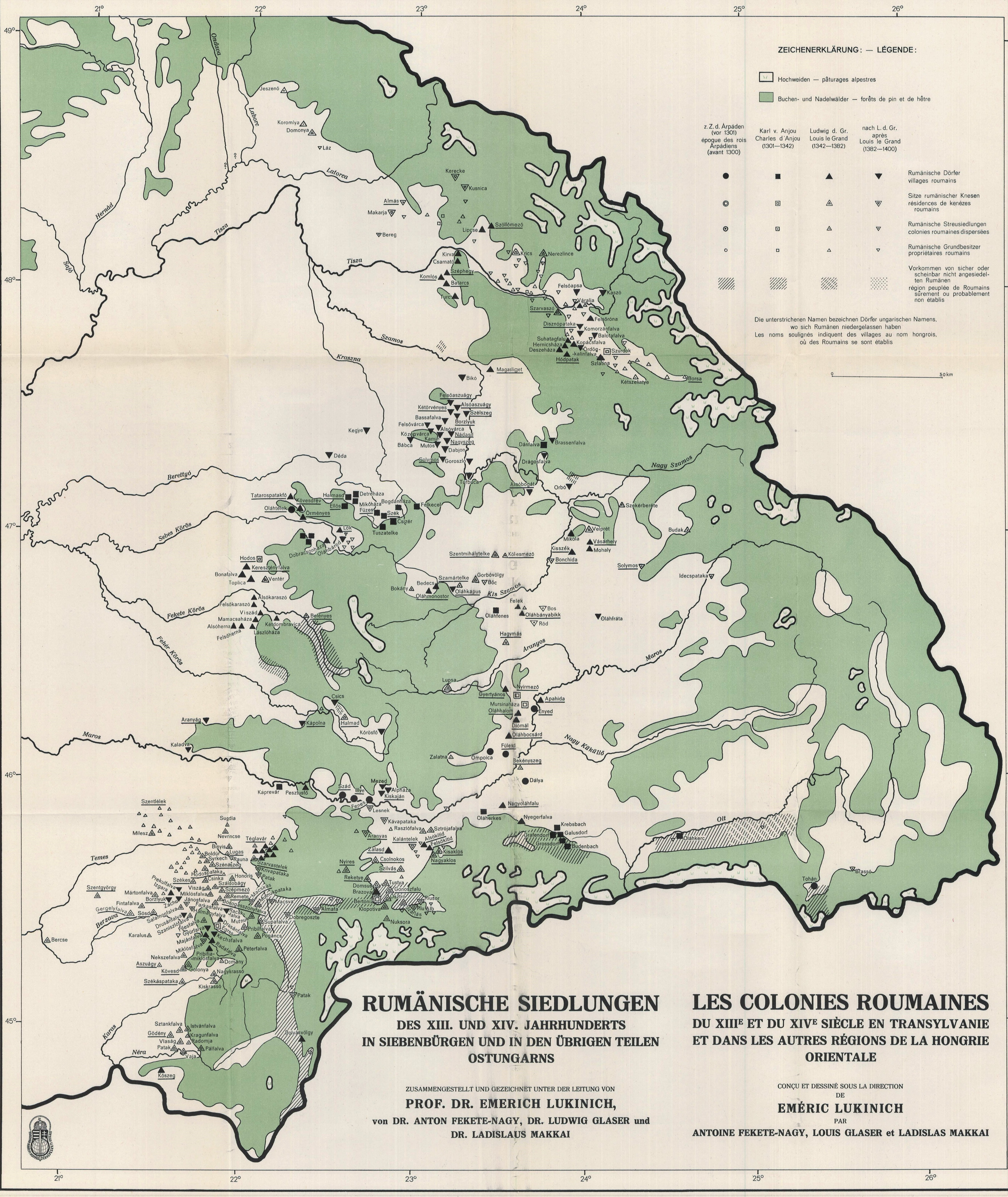 Fekete Nagy, Antonius – Makkai, Ladislaus: Documenta historiam Valachorum in Hungaria illustrantia, usque ad annum 1400 p. Christum. (Budapest, 1941. Études sur l'Europe Centre-Orientale. 29.)